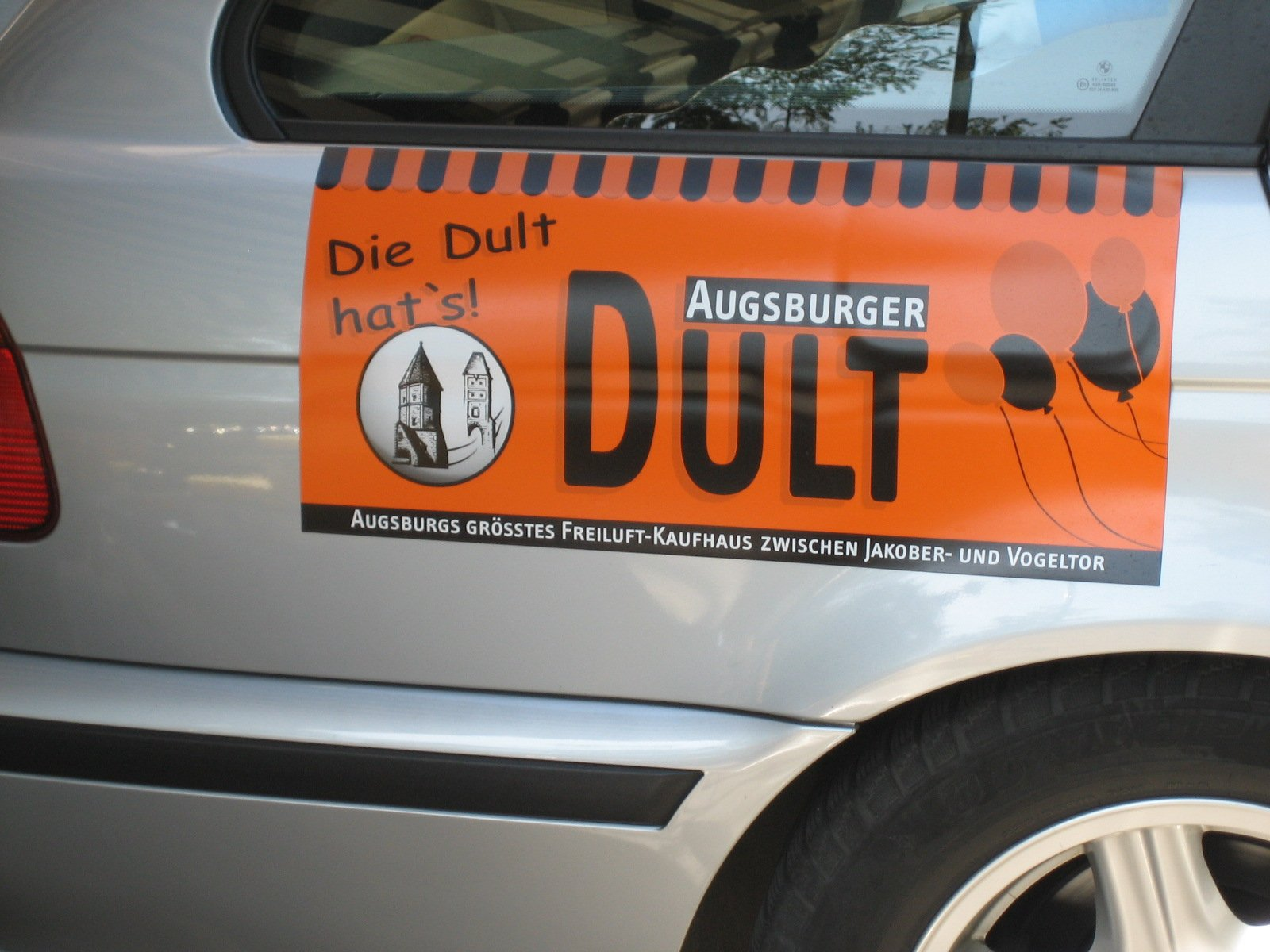 Herbstdult 2009 in Augsburg, ein Werbeaufkleber für die Augsburger Dult auf dem Auto eines Markthändlers